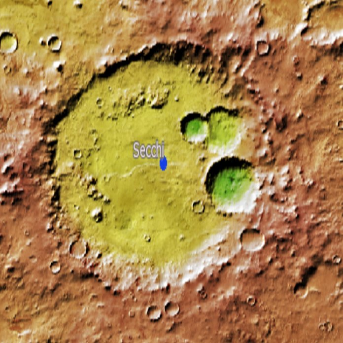 Cráter marciano Secchi. (Imagen IAU/USGS/Goddard/A SU/USGS)